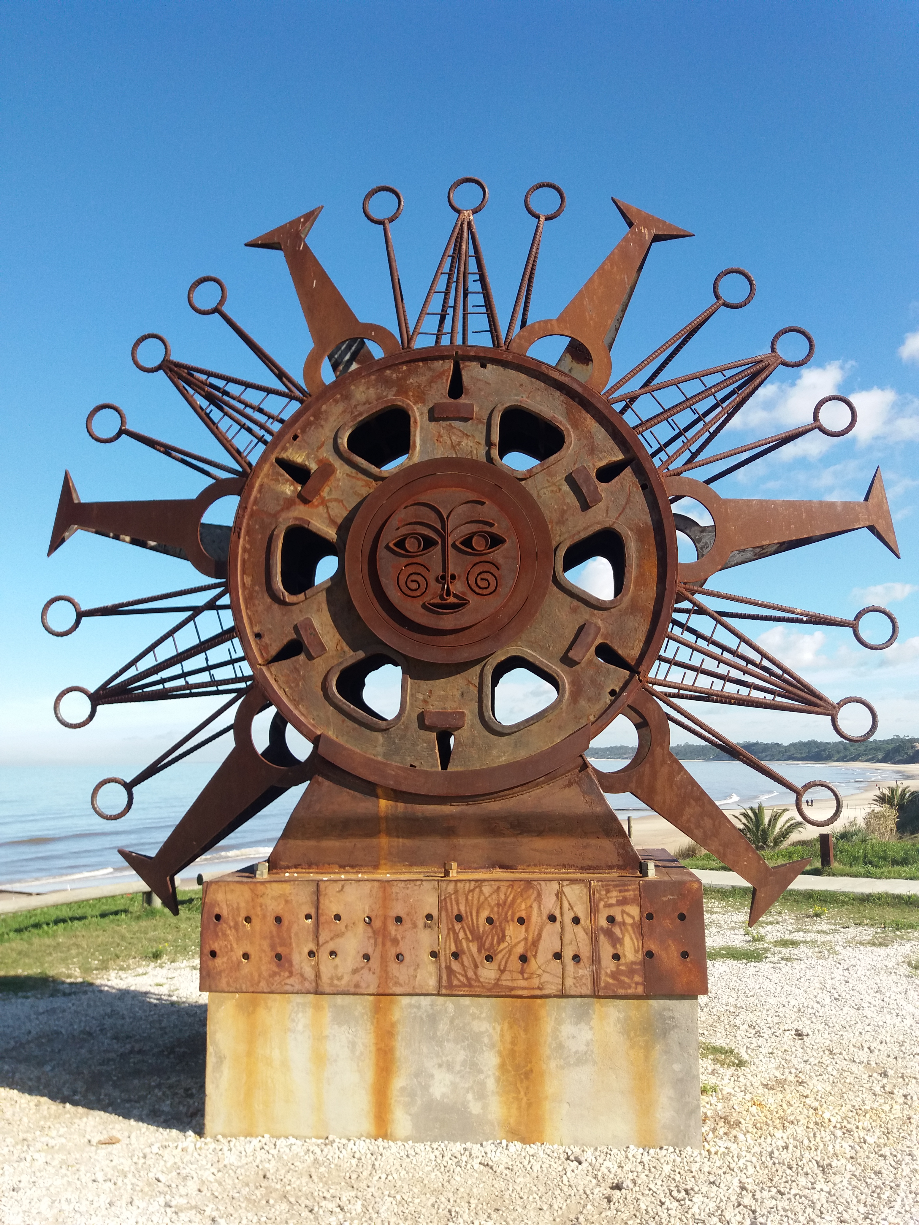 Escultura en hierro realizada por la artista Agó Paez Vilaró